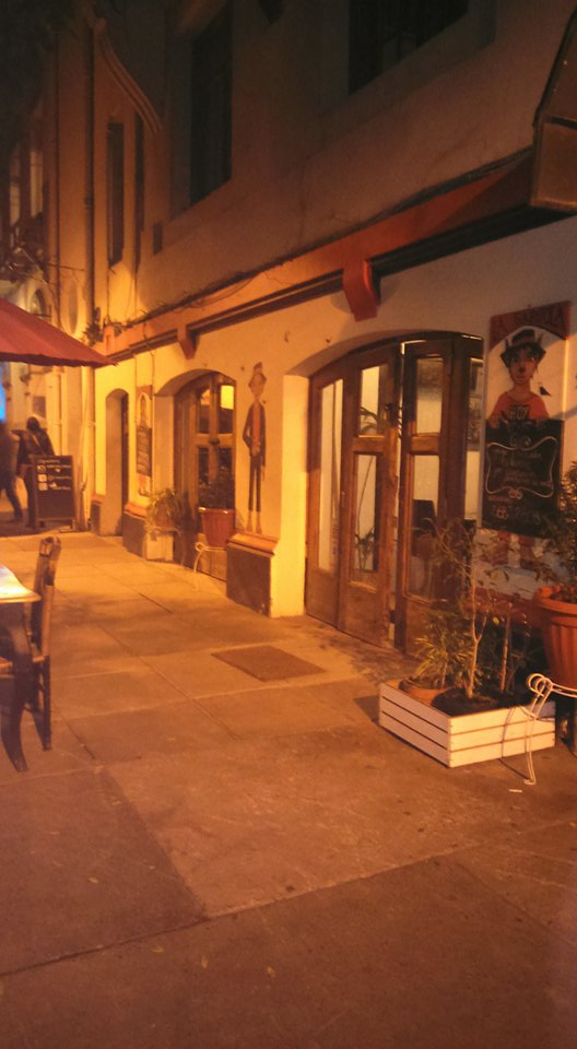 Fotografía del exterior de Espacio Gárgola.